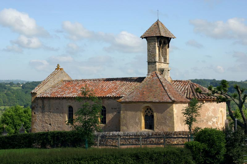 Eglise de Saint-Martin-de-Lixy vue du sud